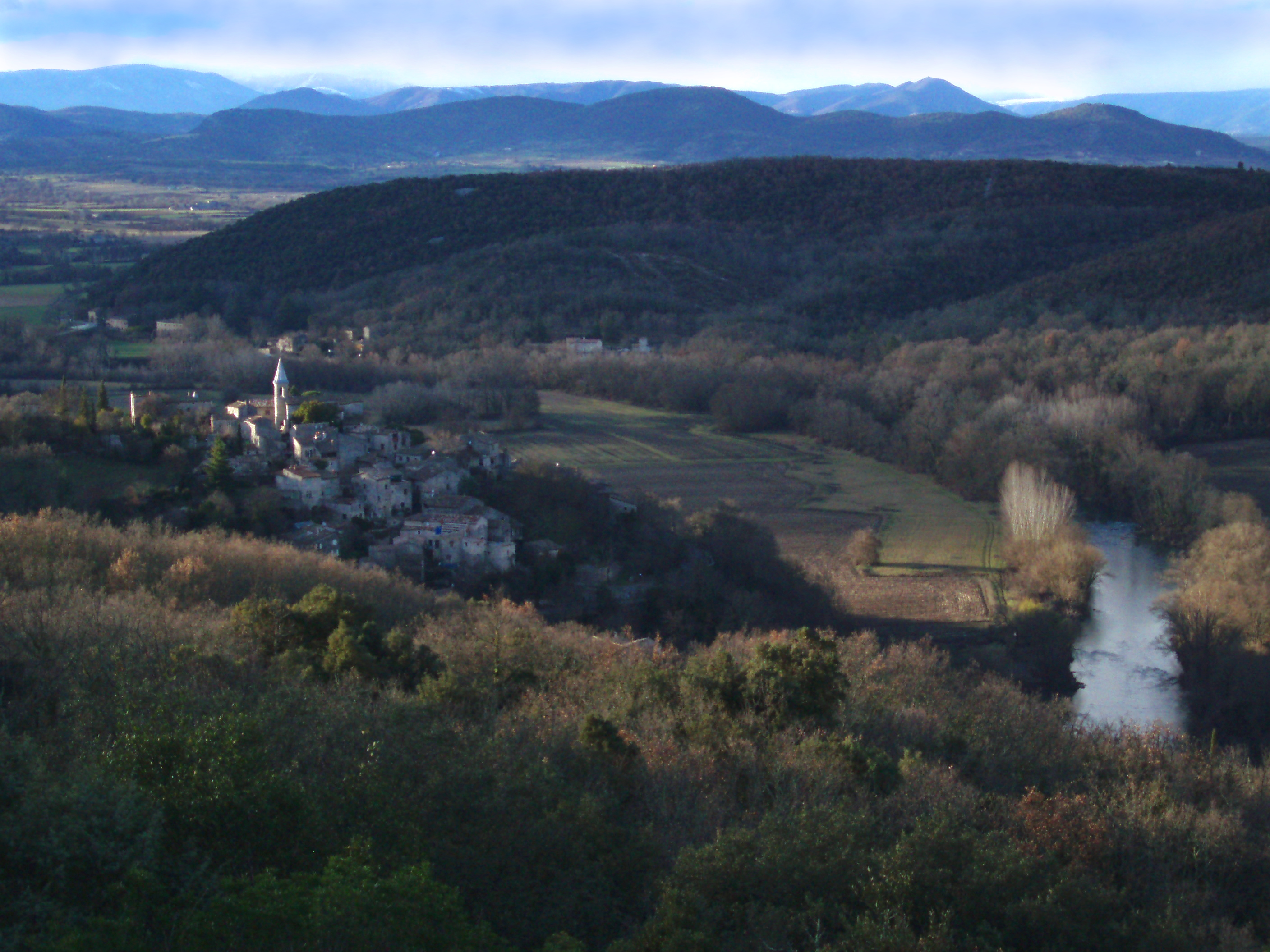 la Cèze et le village de Tharaux vus depuis les hauteurs du plateau de Méjannes-le-Clap.